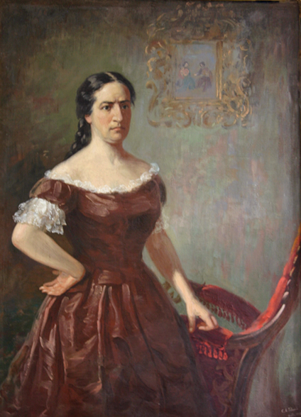 Manuela Cañizares, heroína de la independencia ecuatoriana, durante su edad adulta (alrededor de 30 años).